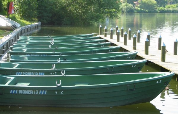 "Pioner 13" robåde ved Vejlesø og Holte Havn. 2004